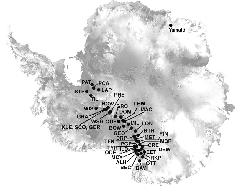 Meteoritenfelder in der Antarktis (NASA)